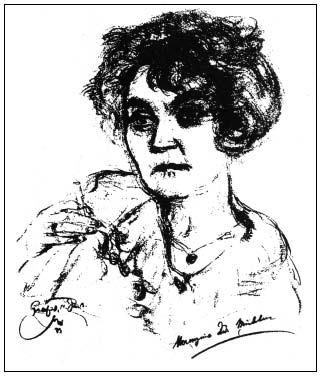 Portrait der Schriftstellerin Hermynia Zur Mühlen